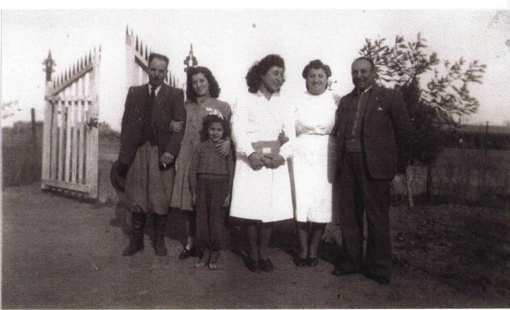 des immigrants de l'Europe habilles comme "des gauchos" au premier jour d'ecole argentine, region de Bahia Blanca, 1940. La photo est mienne.